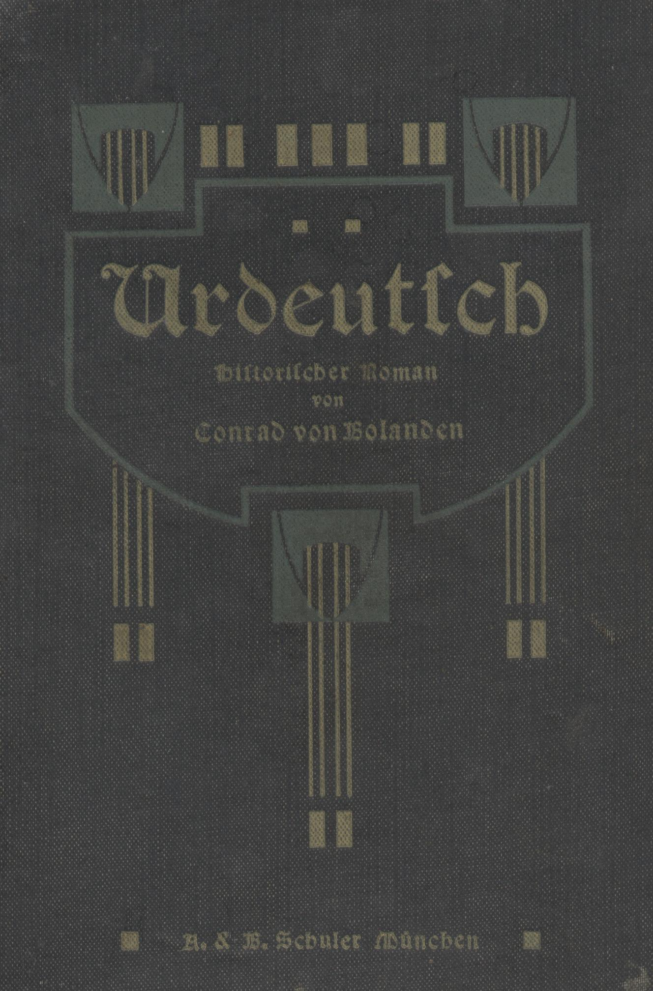 Conrad von Bolanden, Priesterschriftsteller Speyer, Buchcover 1890